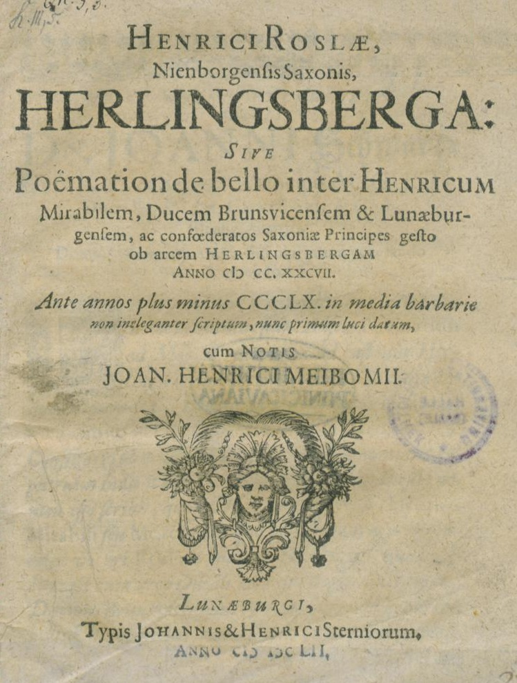 Erstdruck mit Kommentaren (Johann Heinrich Meibom, 1652) des lateinischen Gedichts von Heinrich Rosla über die Schleifung der Harliburg bei Vienenburg im Jahr 1291